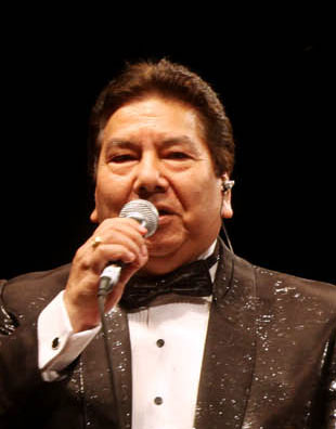 La Sonora de Tommy Rey, también conocida simplemente como Tommy Rey, es una banda de cumbia chilena, liderada por Tommy Rey.